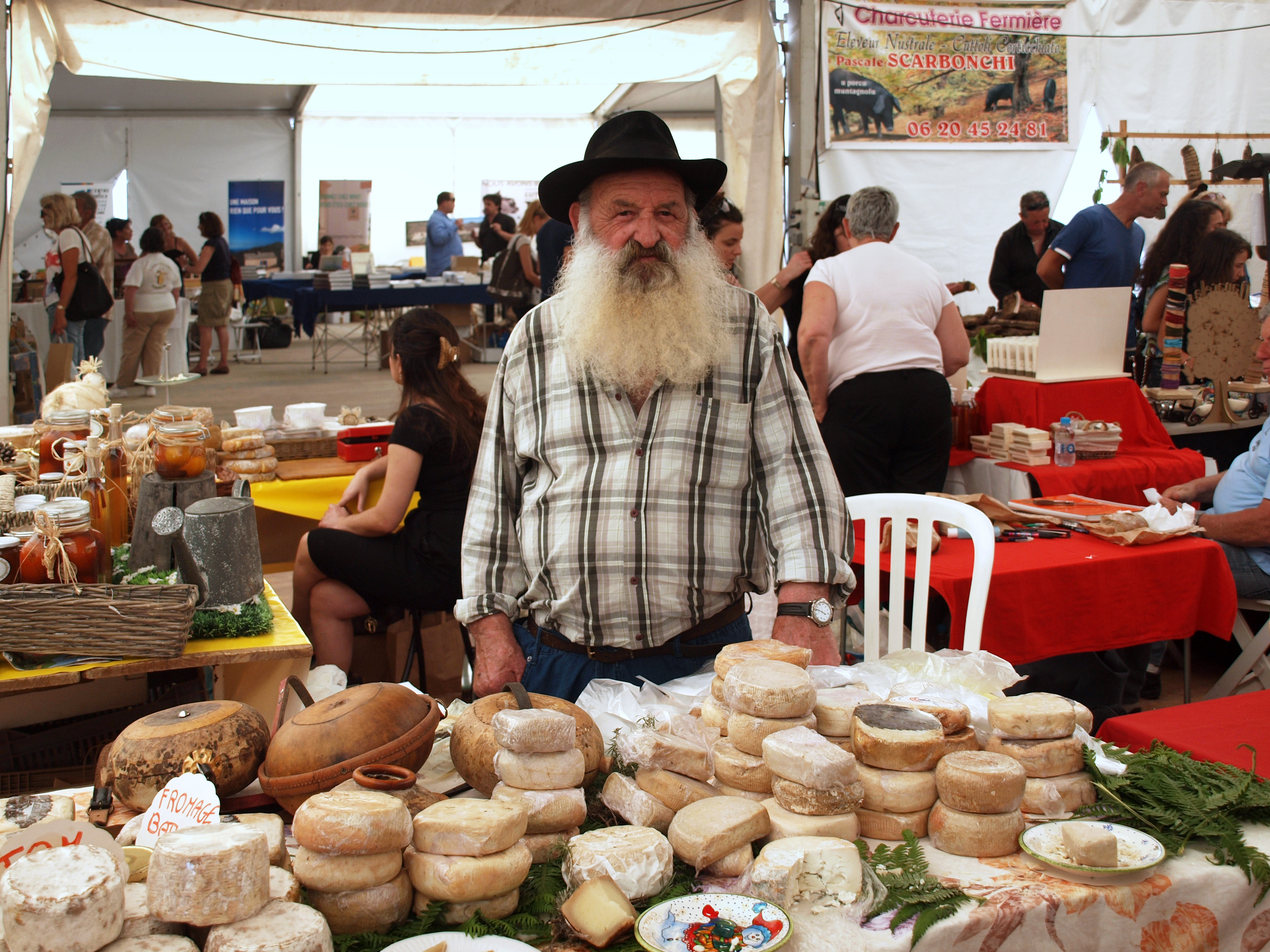 Venaco, Centre Corse (Corse) - Foire du fromage 2012. Stand de fromages de Perelli-d'Alesani dans la Castagniccia